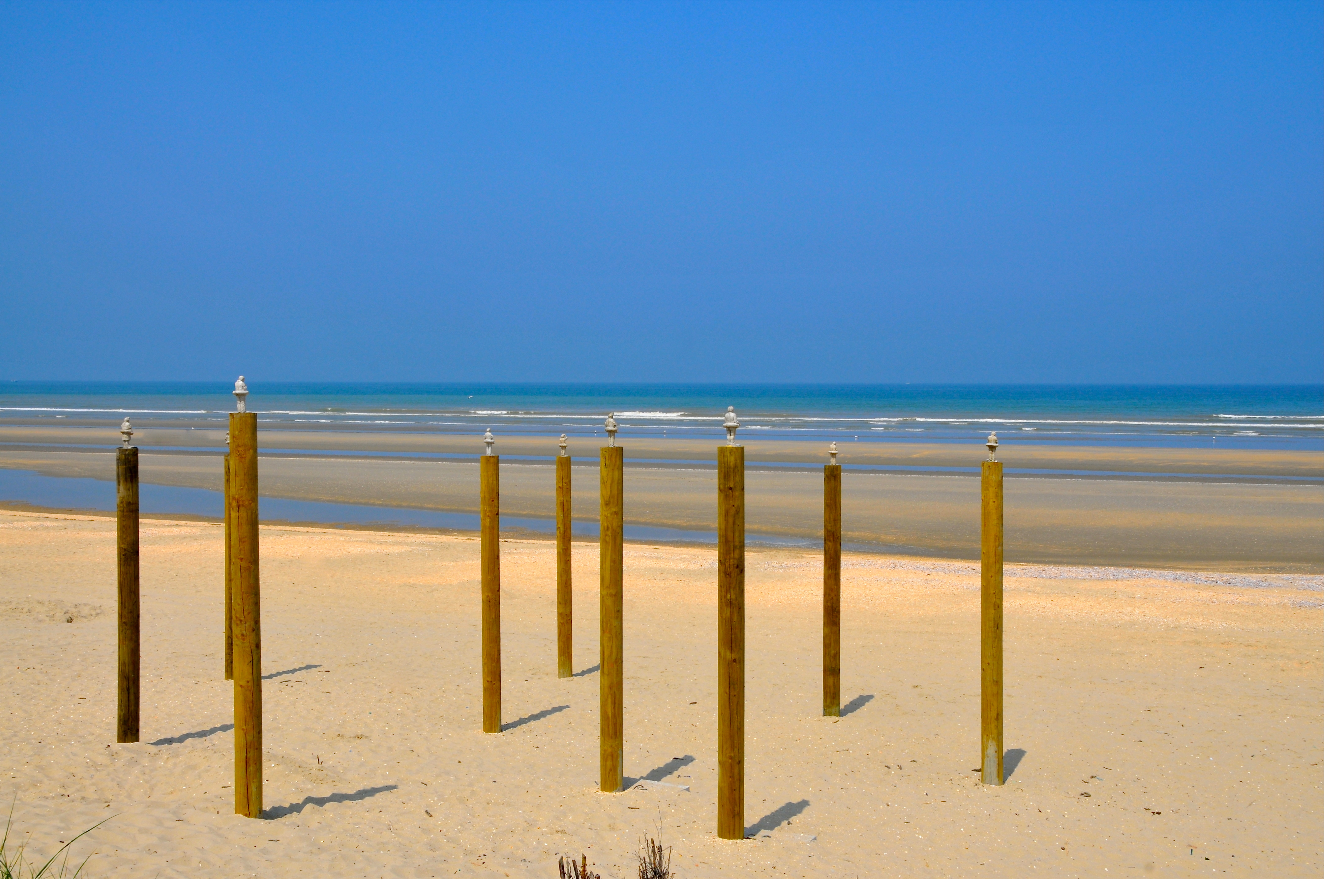 'Waiting For The Climat Change' (2012) van de Spaanse kunstenaar Isaac Cordal. "De kleine figuurtjes staan op een paal, voorlopig nog hoog en droog, te wachten op de gevolgen van de opwarming van de aarde. Met een reddingsboei rond hun middel staan ze gelaten te wachten tot de zee hen komt meevoeren". Beaufort04 is een tentoonstelling van hedendaagse kunst langs de Belgische kust gedurende de zomer van 2012.